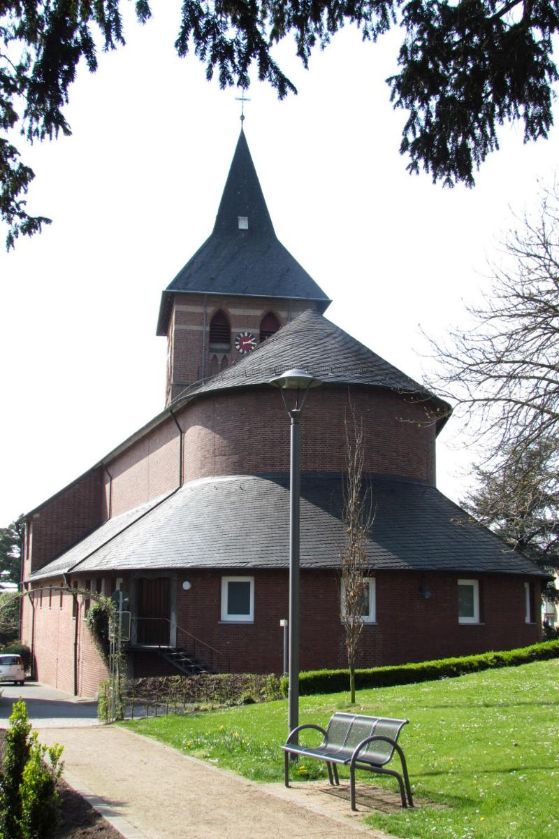 Propsteikirche Wassenberg